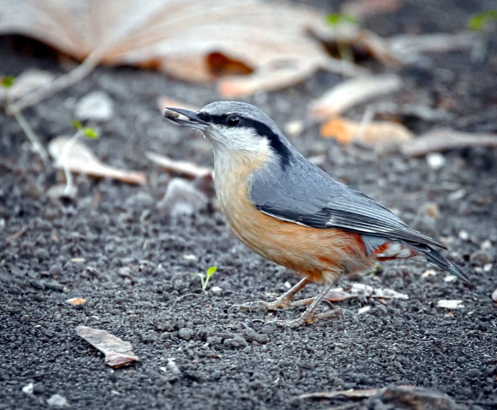 Eurasian nuthatch (Sitta europaea) standing on the ground with a tasty seed found there. Kowalik (Sitta europaea) stojący na ziemi z pysznym ziarenkiem znalezionym tamże.